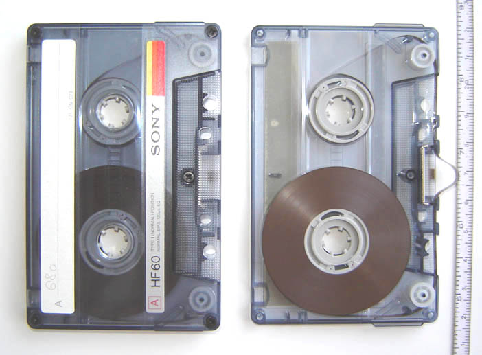 compact audio cassette, normal Fe I tape, Sony